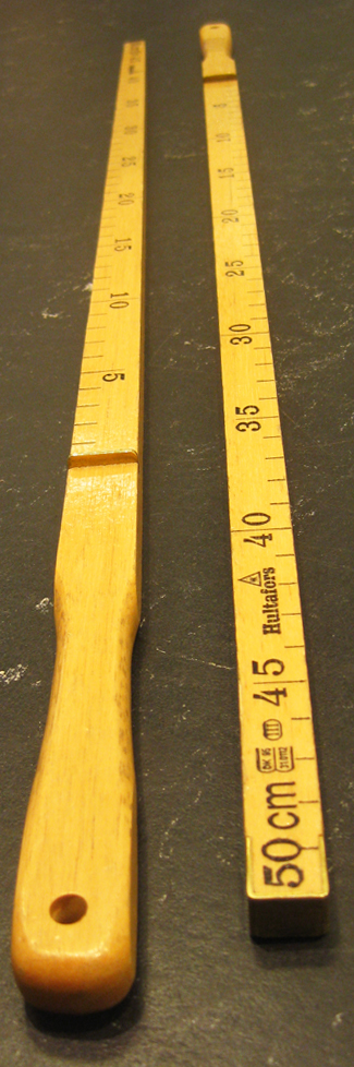 Två butiksmått.